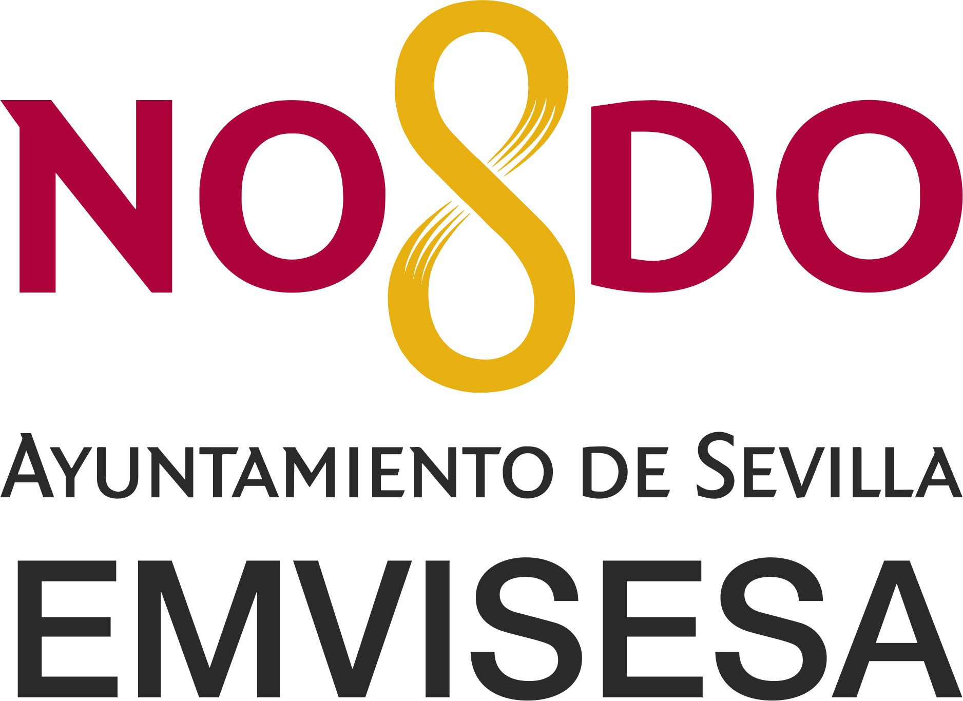 El logotipo está compuesto por el logotipo del Ayuntamiento de Sevilla, con el famoso NO MADEJA DO y el nombre de la empresa pública de la vivienda de Sevilla, EMVISESA.